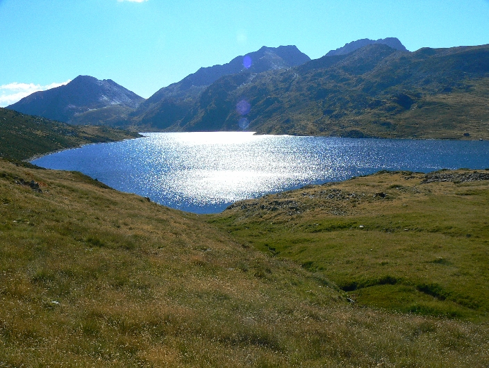 Lac du Lanoux dans les Pyrénées-Orientales.